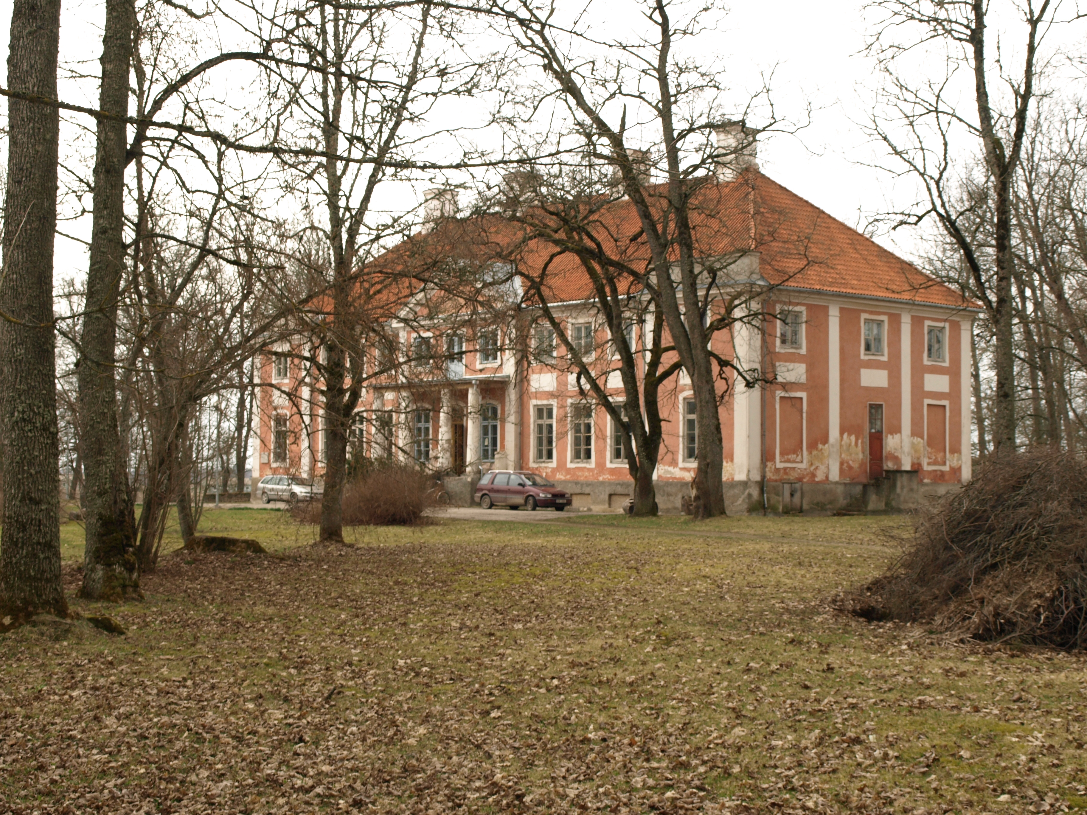 Sargvere mõisa härrastemaja